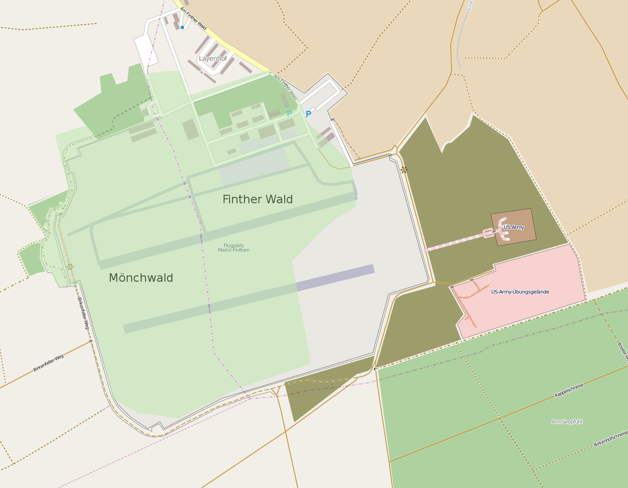 Der ehemalige Finther Wald und der Mönchwald, heute Flugplatz Mainz-Finthen. Hellgrün die 1939 gerodete Waldfläche, dunkelgrün die heutigen Reste beider Wälder.